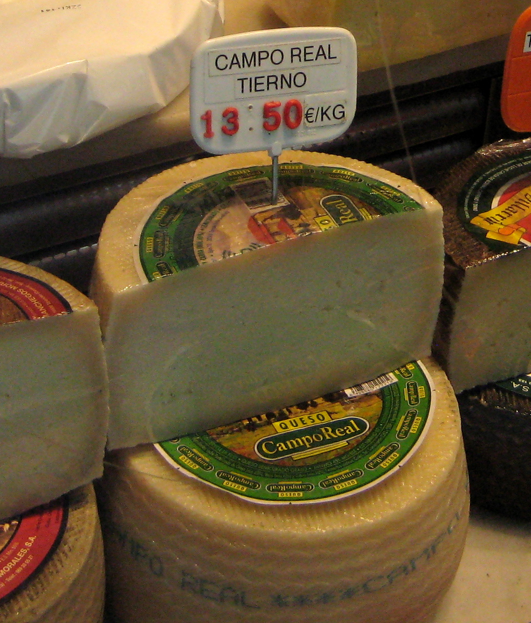 CHEESE!!!